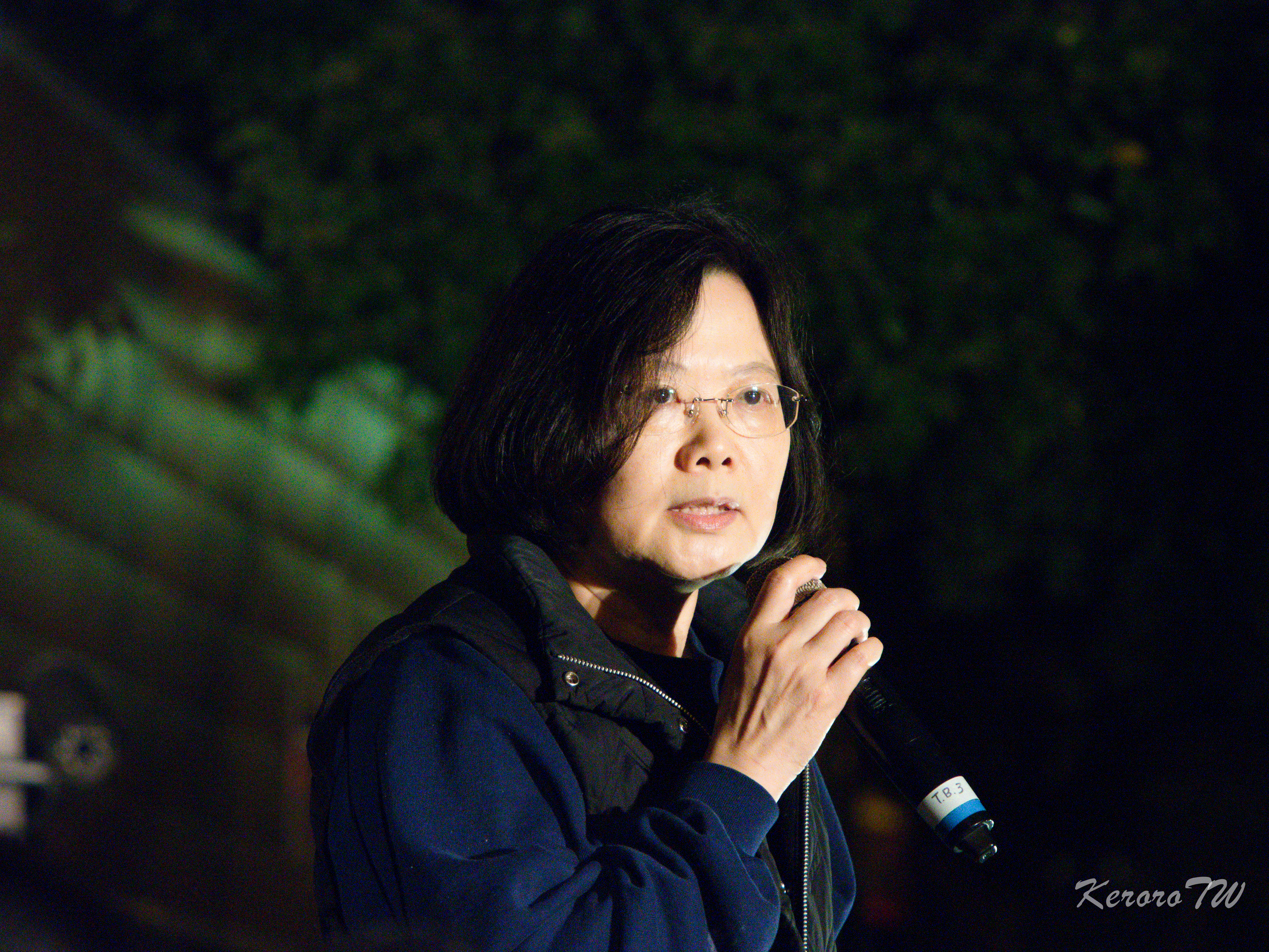 2014-03-18 反黑箱服